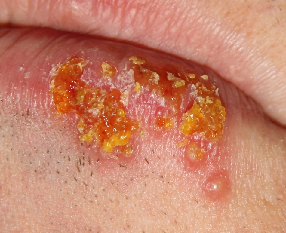 Herpes labialis: offene und stark nässende Bläschen. Rechts unten ein noch geschlossenes Bläschen.